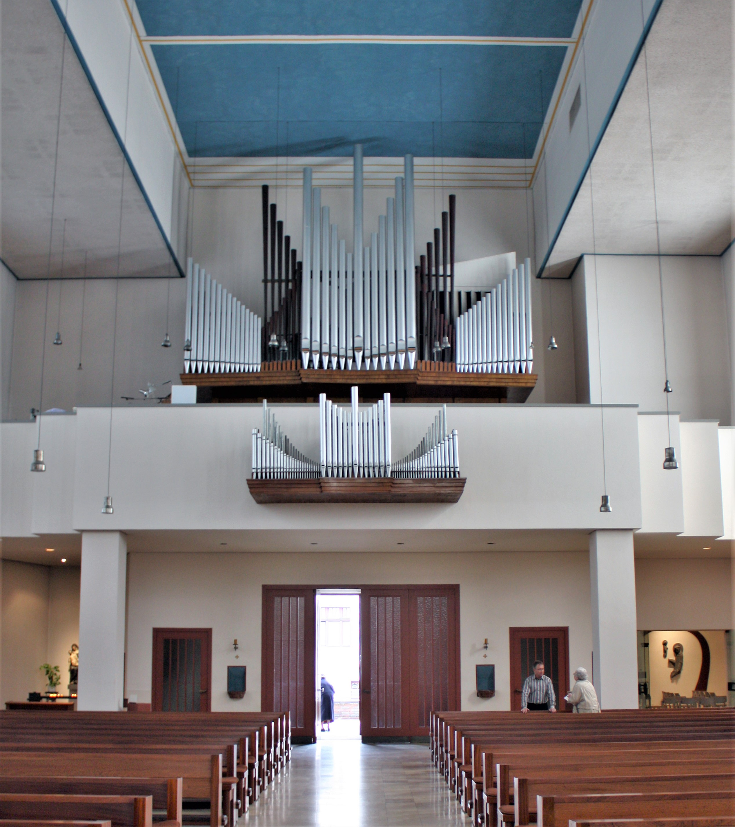 St. Karl Borromäus, Köln-Sülz. Langhaus und Orgelempore